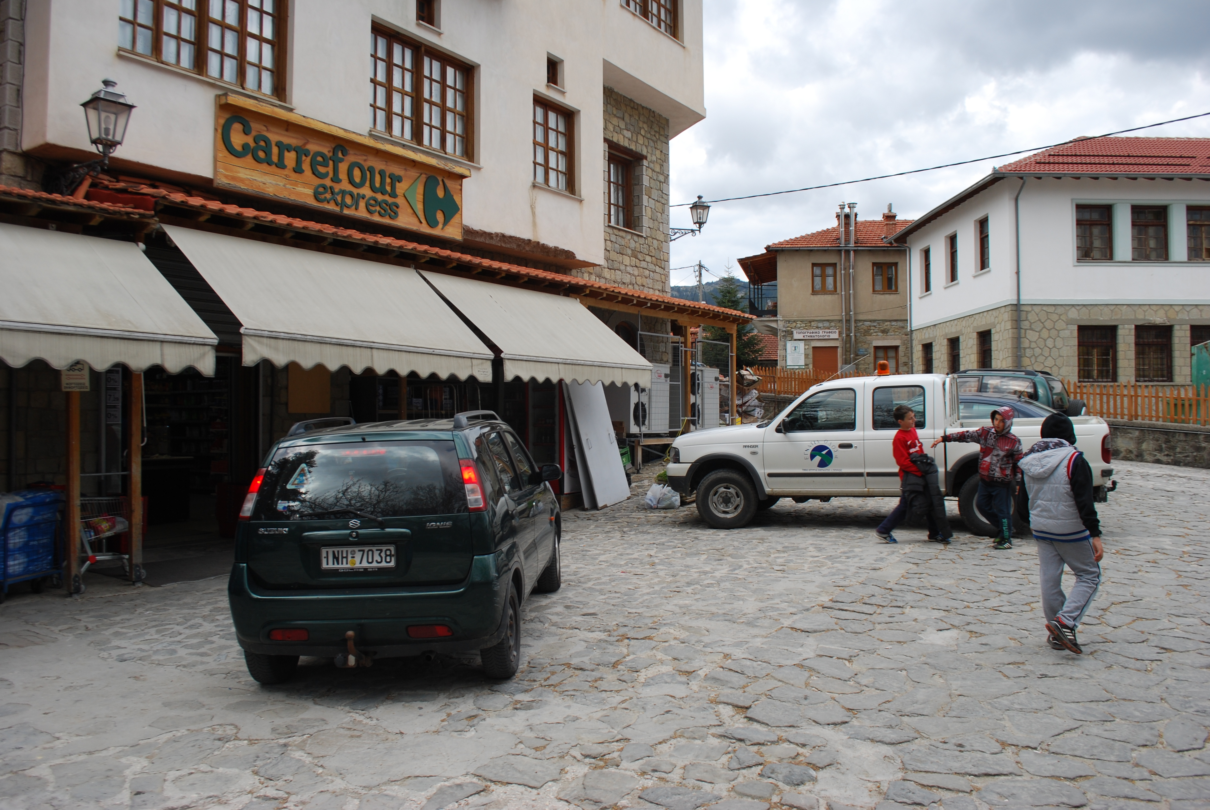 Vue de Metsovo, en Epire.